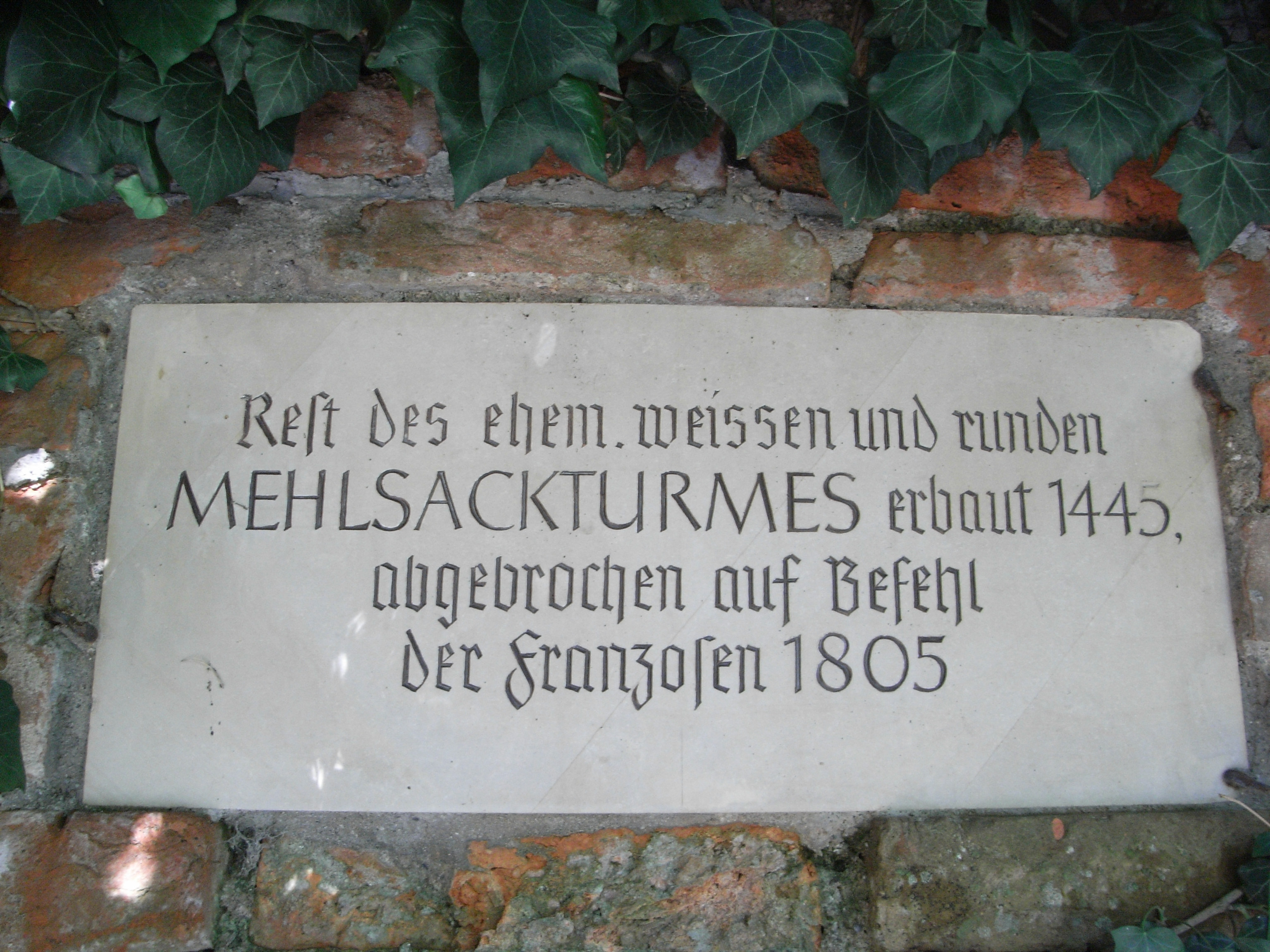 Geschichtstafel des Weißen Mehlacks in Memmingen